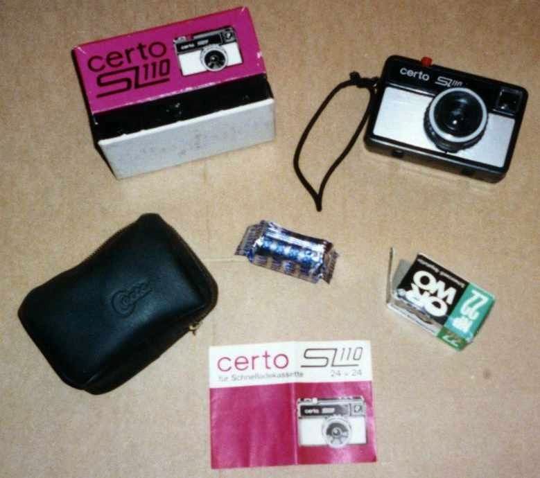 Certo SL 110 mit Verkaufsverpackung, Kameratasche, Beschreibung, 1 ORWO NP22-36 SL-Kassette originalverpackt